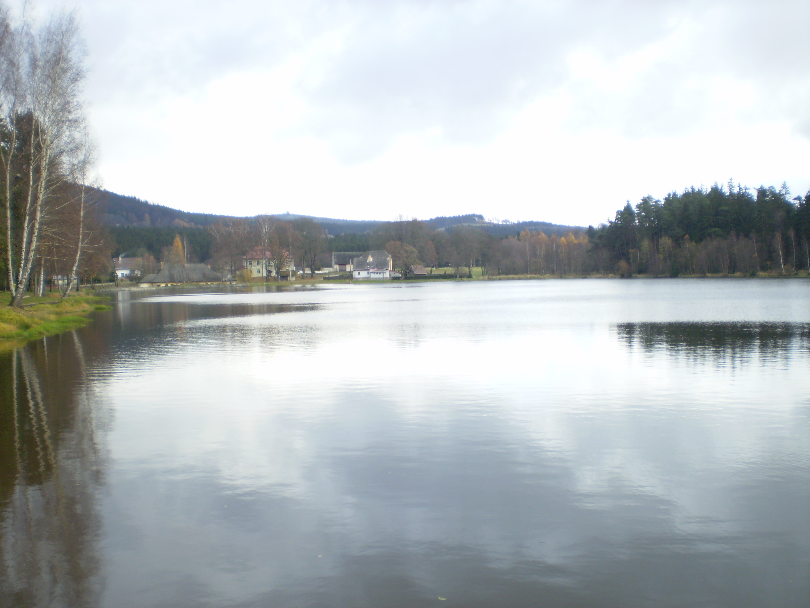 Milovský rybník